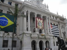 Faculdade de Direito do Largo de São Francisco (2005) converted to PNG by Laobc